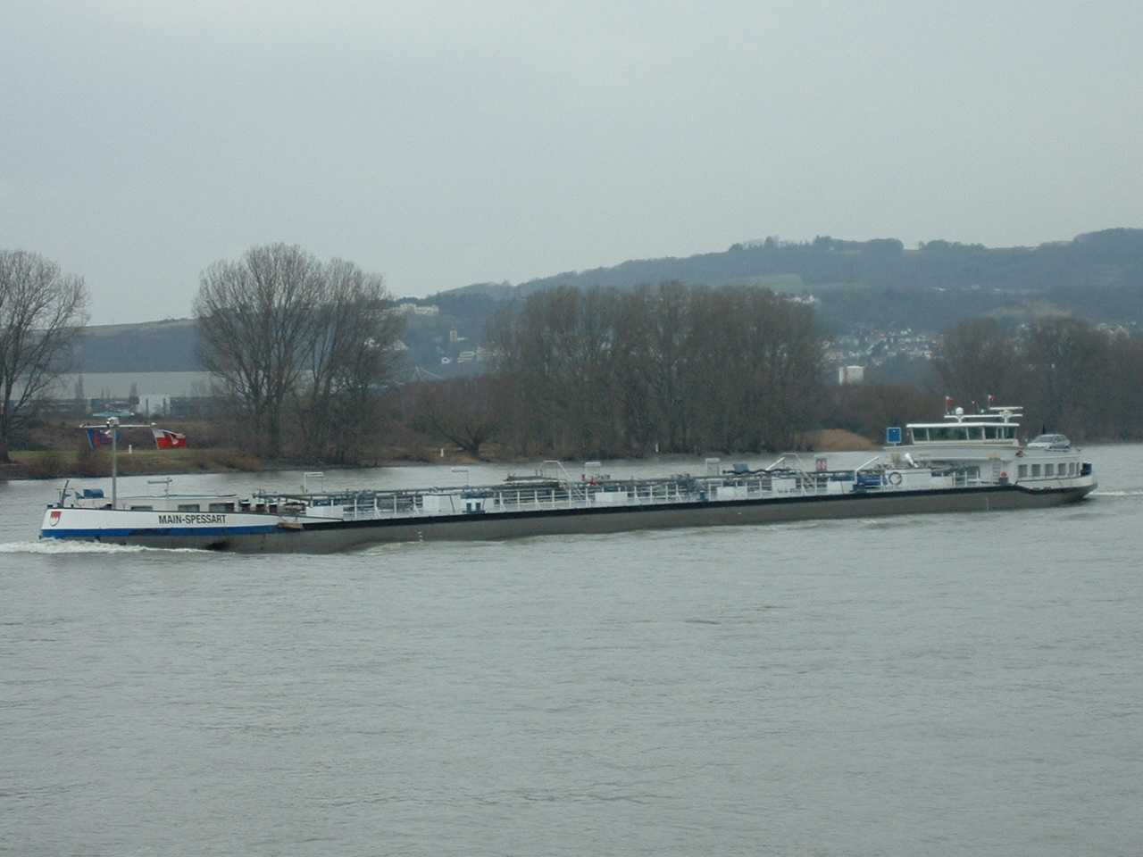 Binnentanker MAIN-SPESSART ENI Nummer: 02320804 F.Lang eigenes Bild 23.02.2007